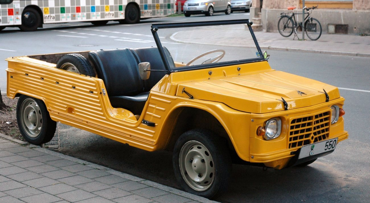 Citroën Méhari mit offenem Dach